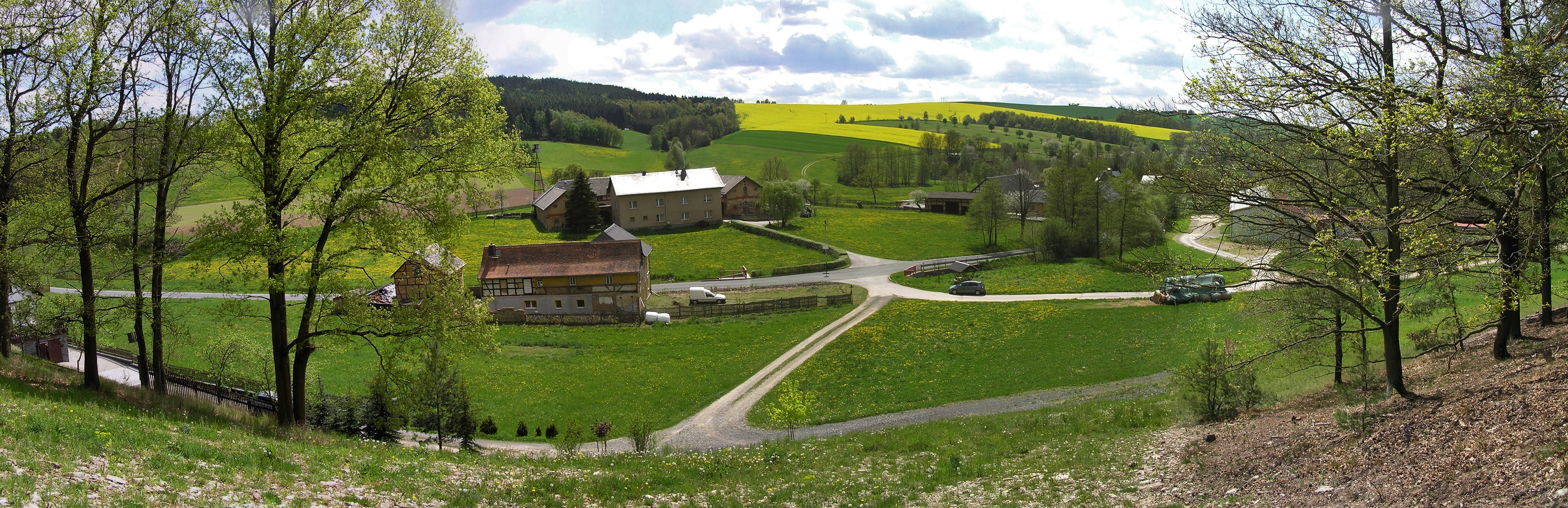 Untergeißendorf (Blick von Nord)